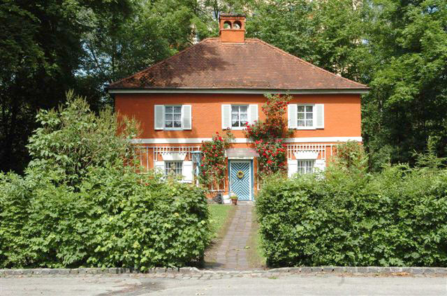 Kraemer’sche Kunstmühle, Wohngebäude, von Osten gesehen